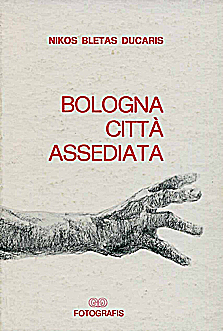 Buchdeckel für "Bologna citta' assediata" von Nikos Bletas Ducaris